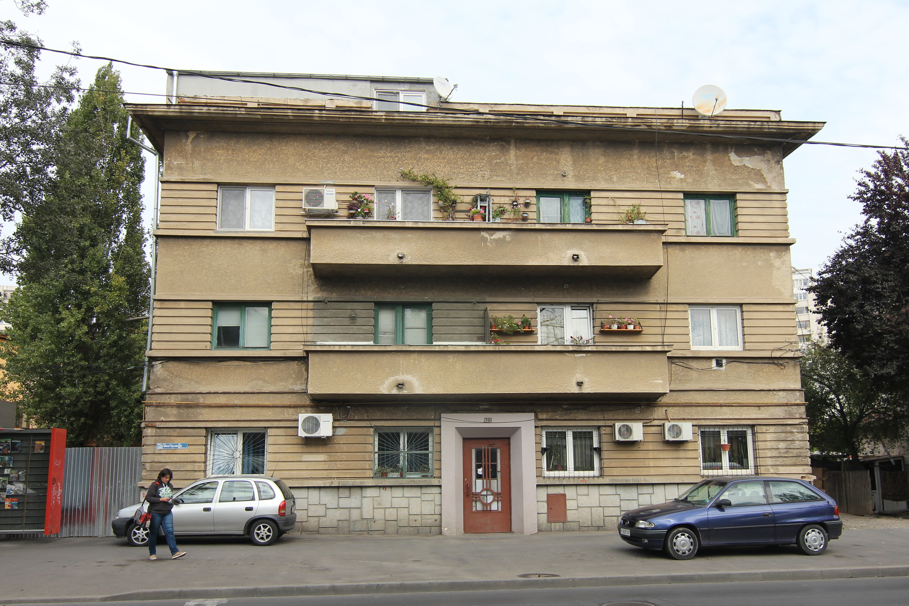 Casă pe Dudești